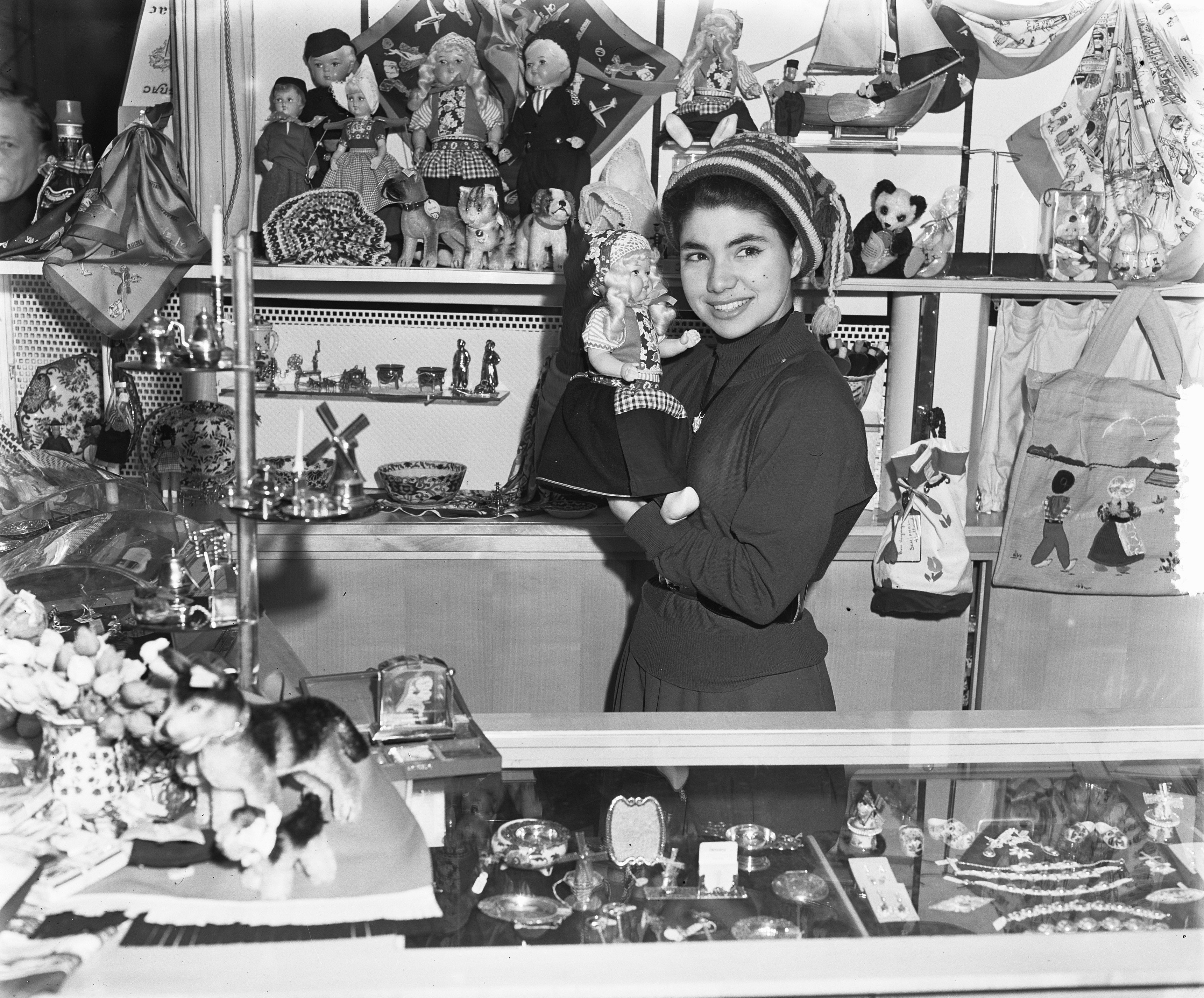 Collectie / Archief : Fotocollectie Anefo Reportage / Serie : [ onbekend ] Beschrijving : Aankomst Vanja Orico (Braziliaanse filmster) Annotatie : Zij was bekend van de film "O Cacangeiro", prijswinnaar in het filmfestival in Cannes en acteerde in 1954 in de Westduitse filmproductie "Conchita und der Ingenieur" Datum : 7 februari 1954 Trefwoorden : aankomsten, actrices, filmsterren Persoonsnaam : Orico, Vanja Fotograaf : Rossem, Wim van / Anefo Auteursrechthebbende : Nationaal Archief Materiaalsoort : Glasnegatief Nummer archiefinventaris : bekijk toegang 2.24.01.09 Bestanddeelnummer : 906-2907